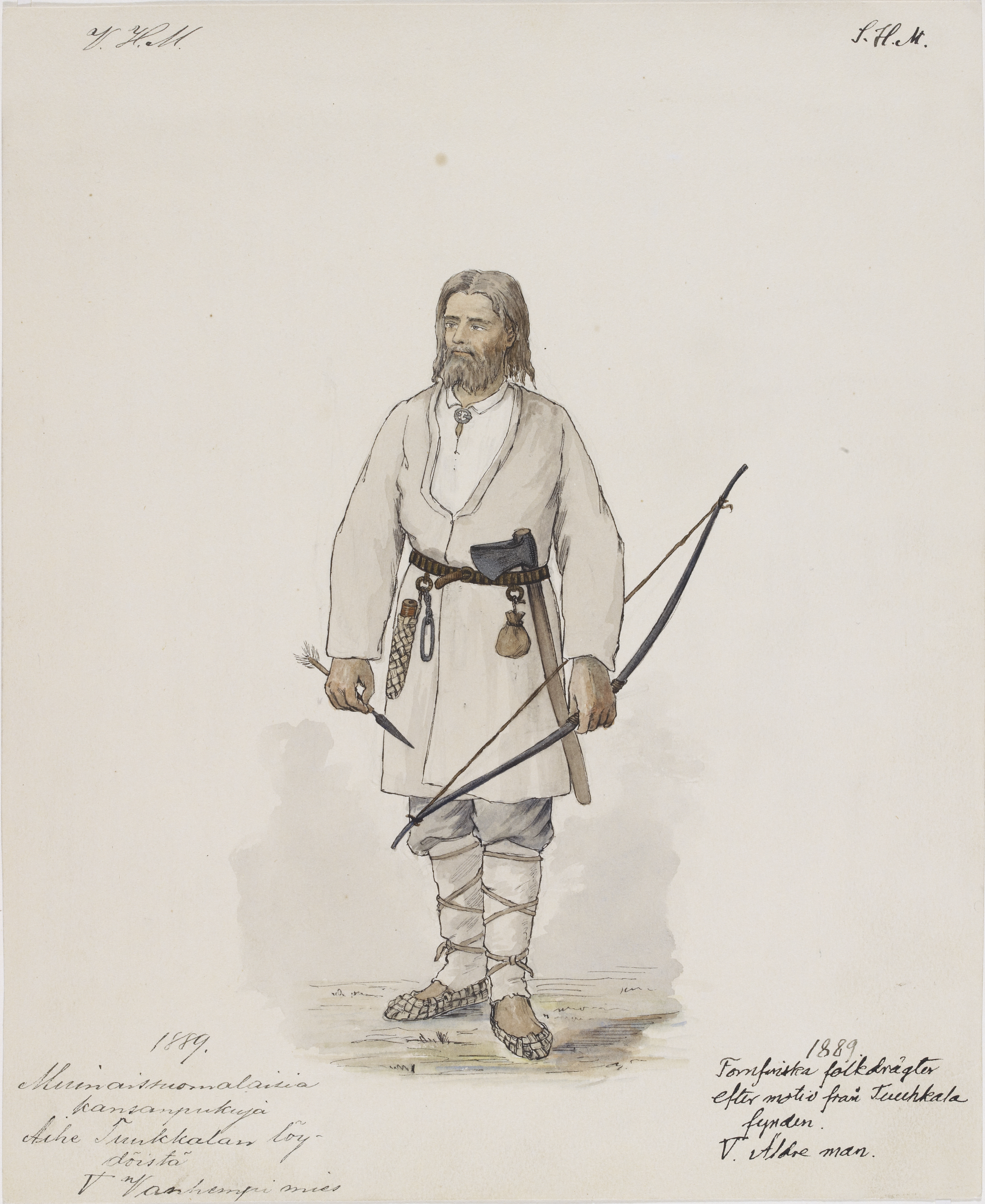 Rautakautinen miehen asu Mikkelin Tuukkalan löytöjen mukaan. Vuoden 1889 tulkinta.